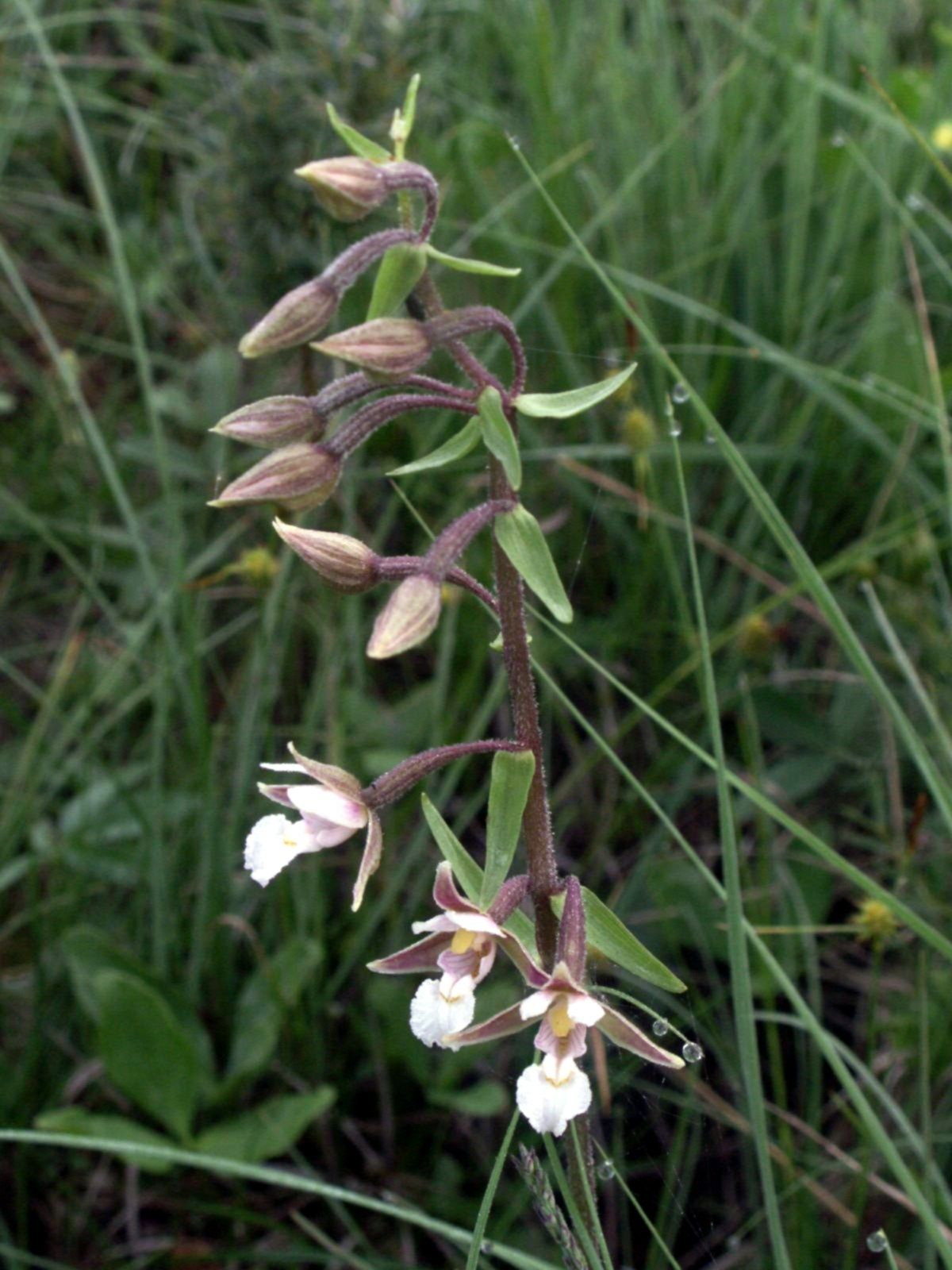 Epipactis palustris, Niedermoor, Litauen